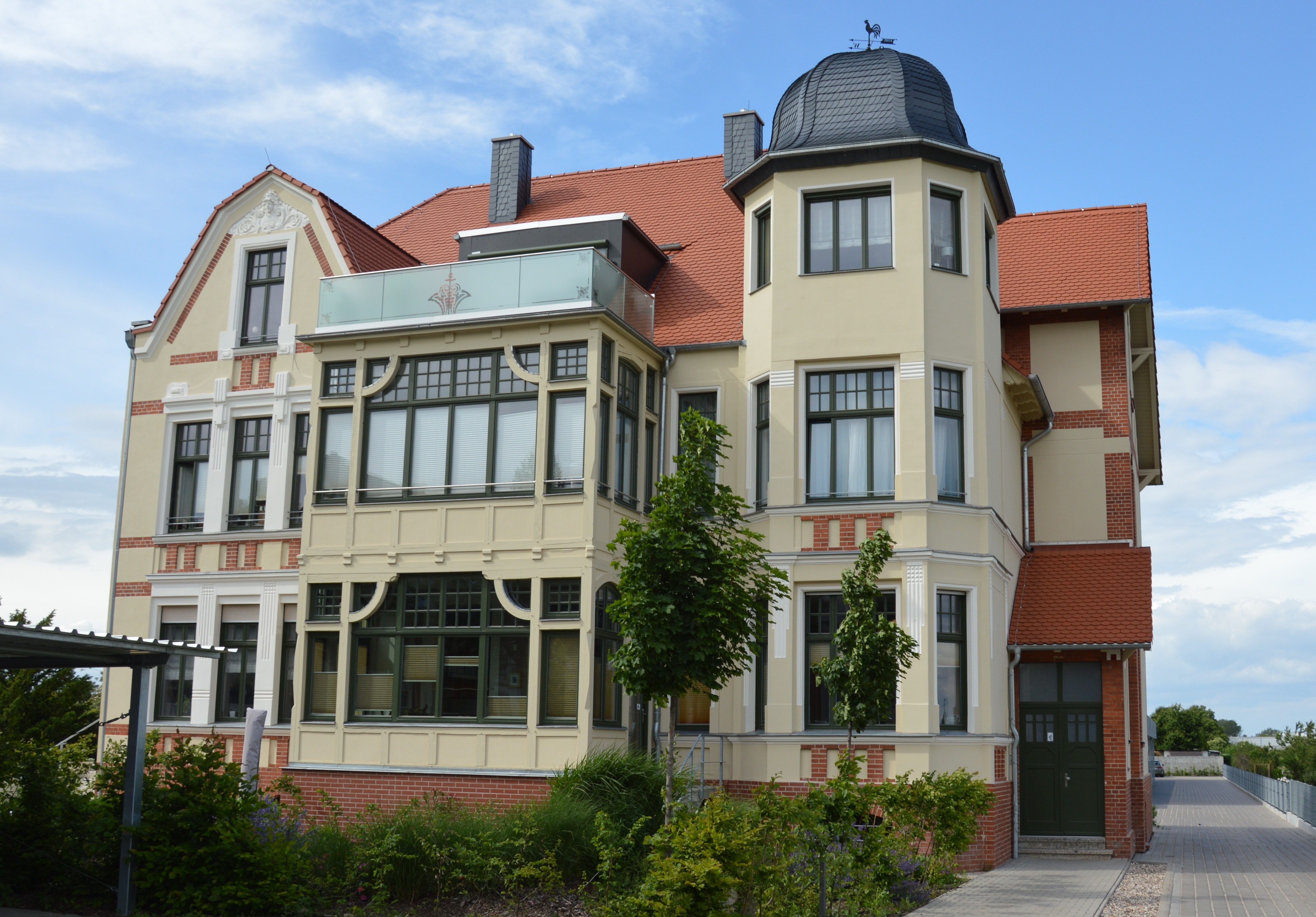 Haus Braunschweiger Straße 44 in Magdeburg